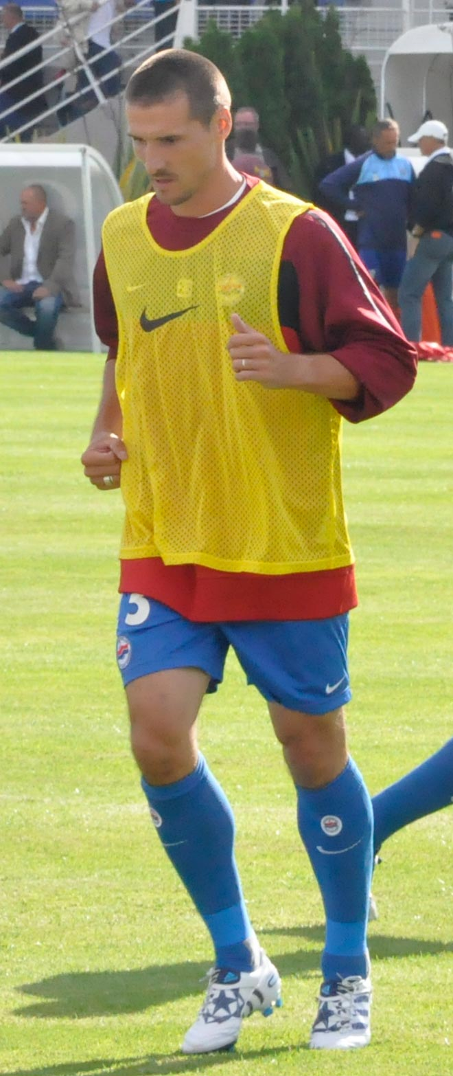 Grégory Tafforeau lors du match amical contre Le Havre